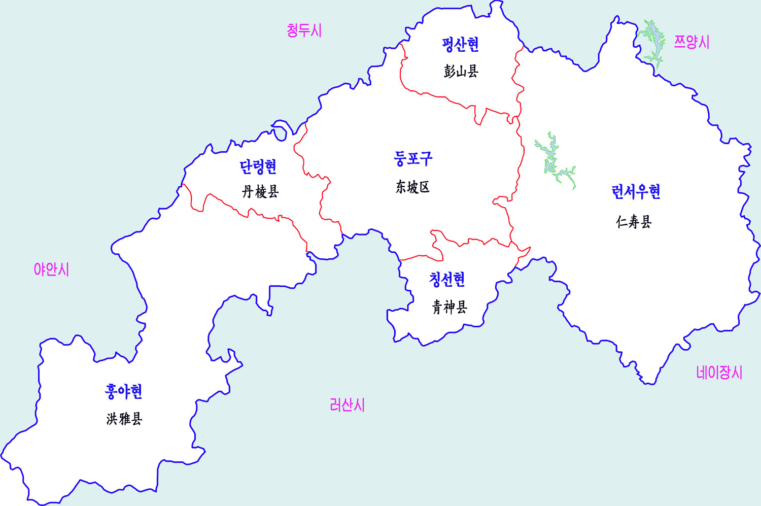 메이산시 행정구역도